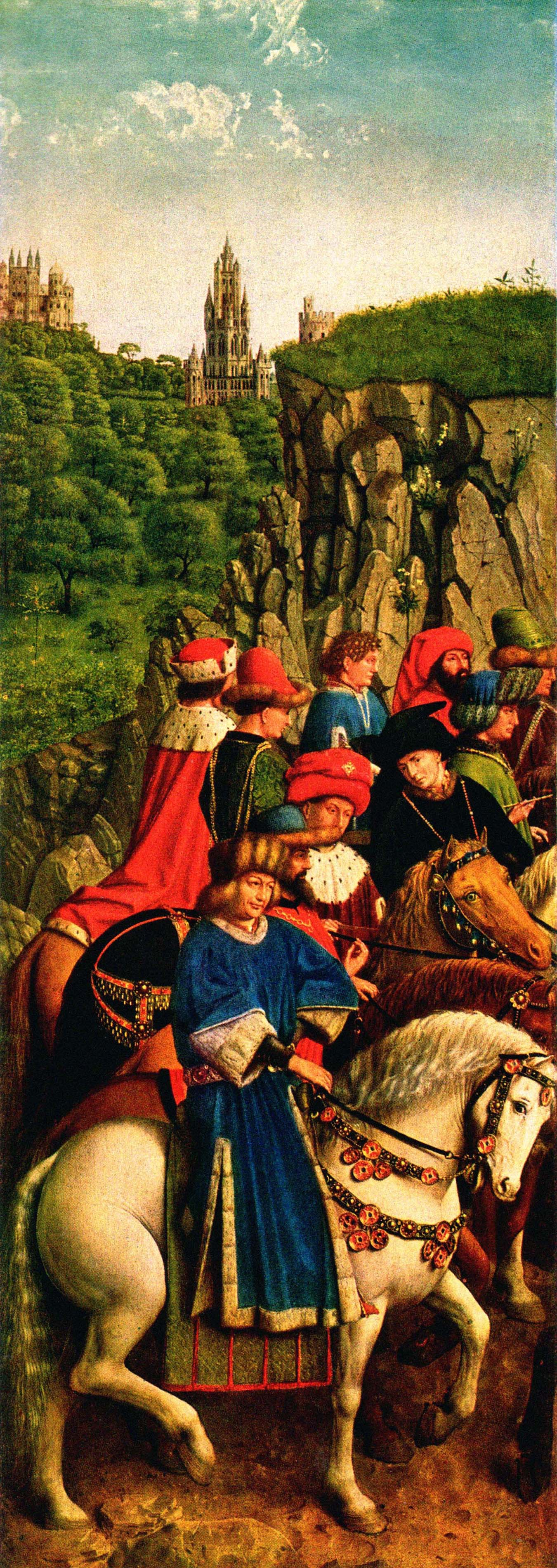 paneel linksonder op het Lam Gods, een drieluik dat boven het altaar hing van de Vijdt-kapel